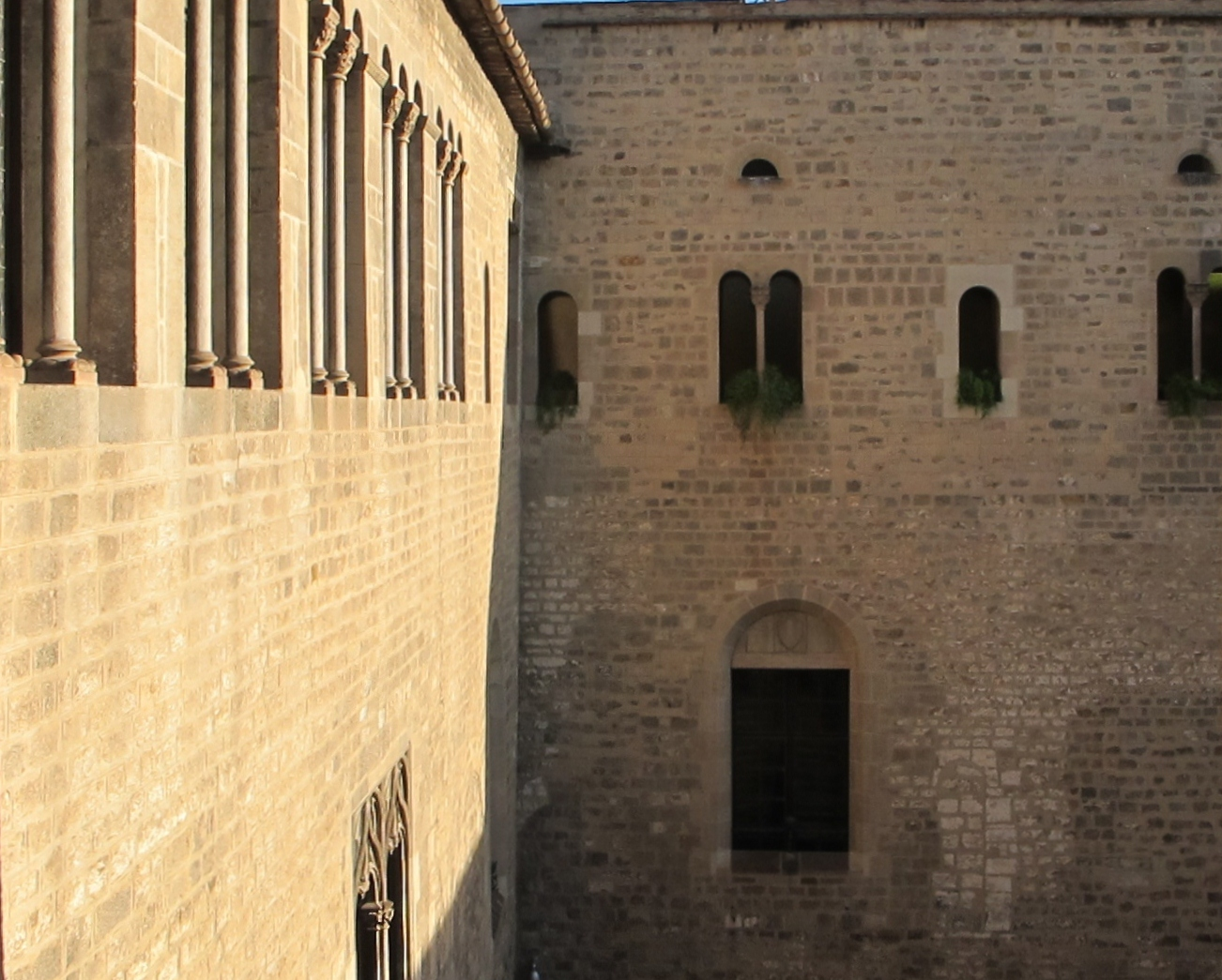 Vista de les finestres flamigeres del segon pis del palau episcopal de Barcelona